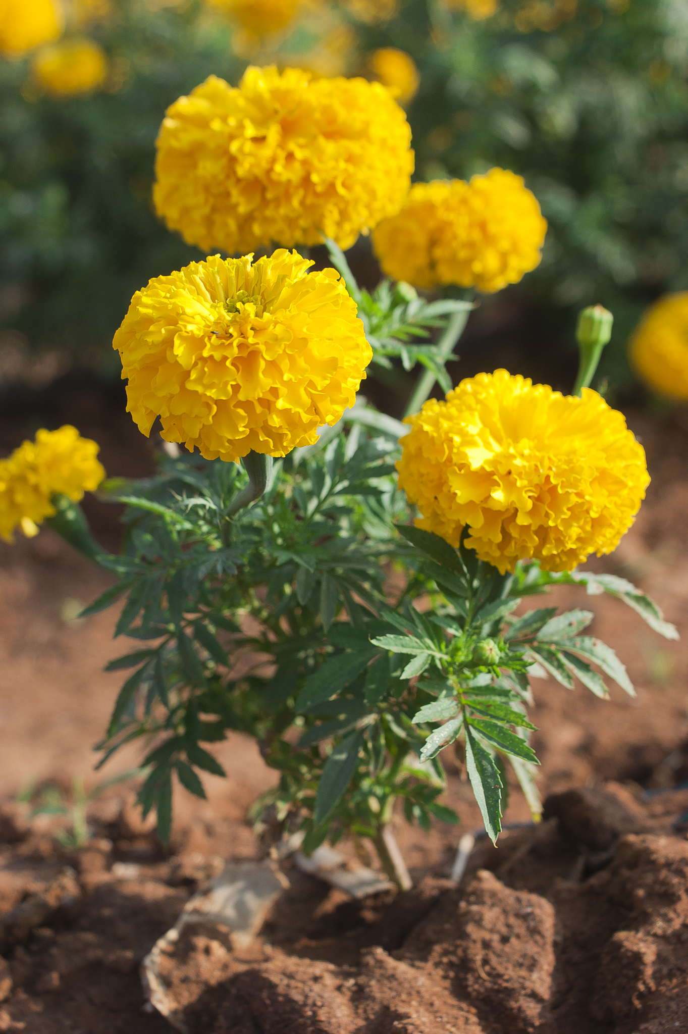 Tagetes erecta full plant.